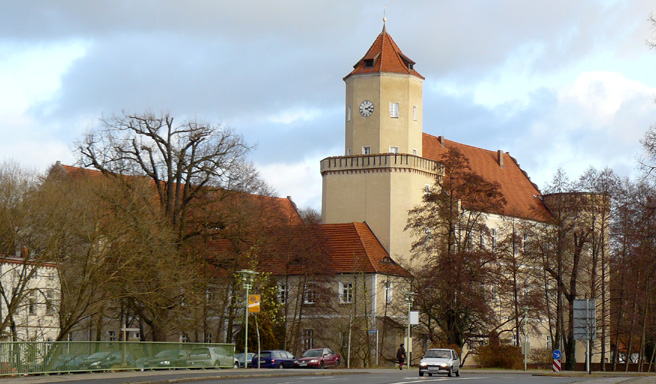 Schloß in der Stadt Spremberg/ Brandenburg/ Deutschland